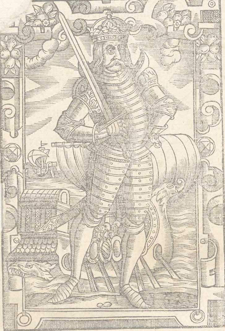 Wizimir